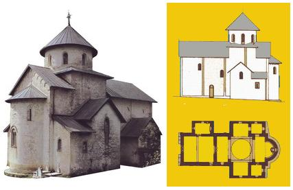 Morački manastir: Crkva Uspenja Bogorodice.